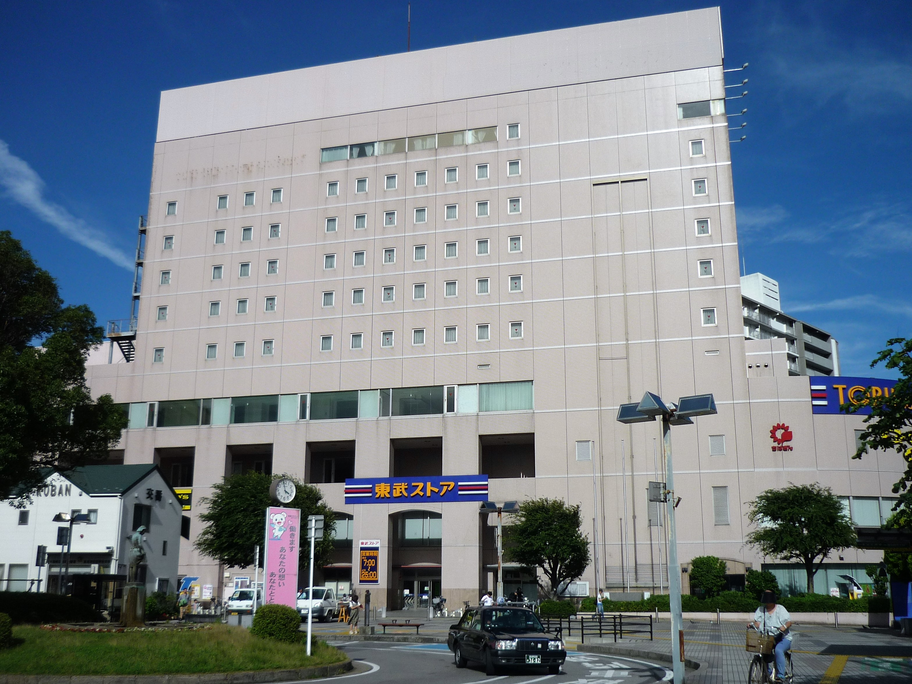 東武ストア津田沼店（京成津田沼駅前）